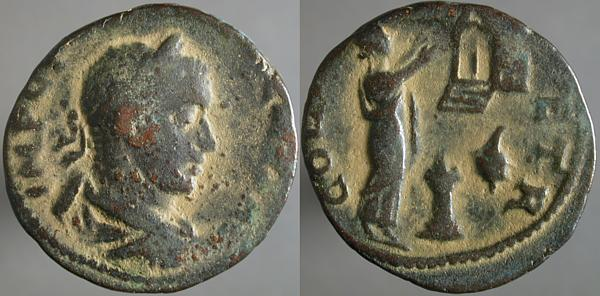 Gallieno, AE29, zecca di Tiro IMP C[ P LIC GALLIENVS AVG?], busto laureato e drappeggiato a destra COL[ TVRO M]ETR, Didone in piedi rivolta a destra, in preghiera davanti ad un tempio, altare sotto, conchiglia a destra Non catalogato Licensing Moneta da HobbyBlog, foto di Ed Flinn. Permesso: Utente:Panairjdde/HobbyBlog Coin from HobbyBlog, photo by Ed Flinn. Permission: Utente:Panairjdde/HobbyBlog